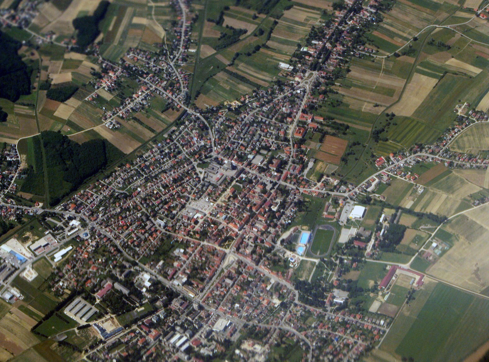 Križevci iz zraka